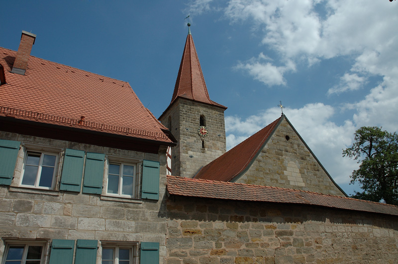 Leinburger Kirche